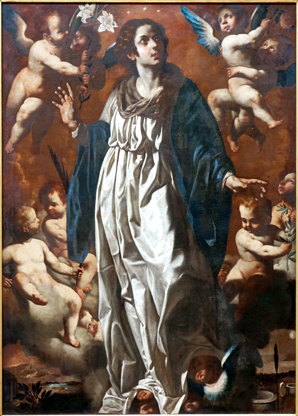 L'immaculée Conception, Palais des Beaux-Arts de Lille (Nord).